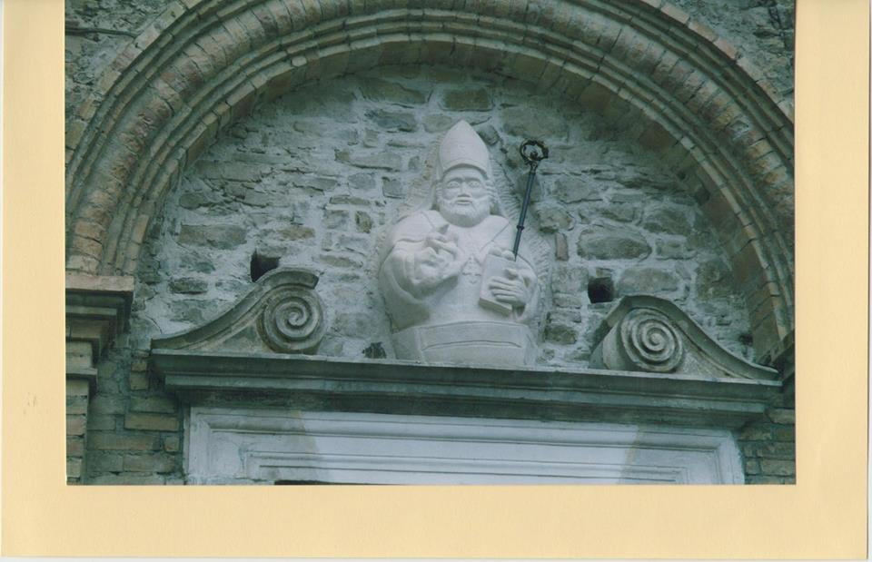 Scultura in pietra raffigurante il busto di San Nicola, collocato sul portale della facciata della chiesa parrocchiale di Arsita, opera dello scultore abruzzese Diego Mostacci.